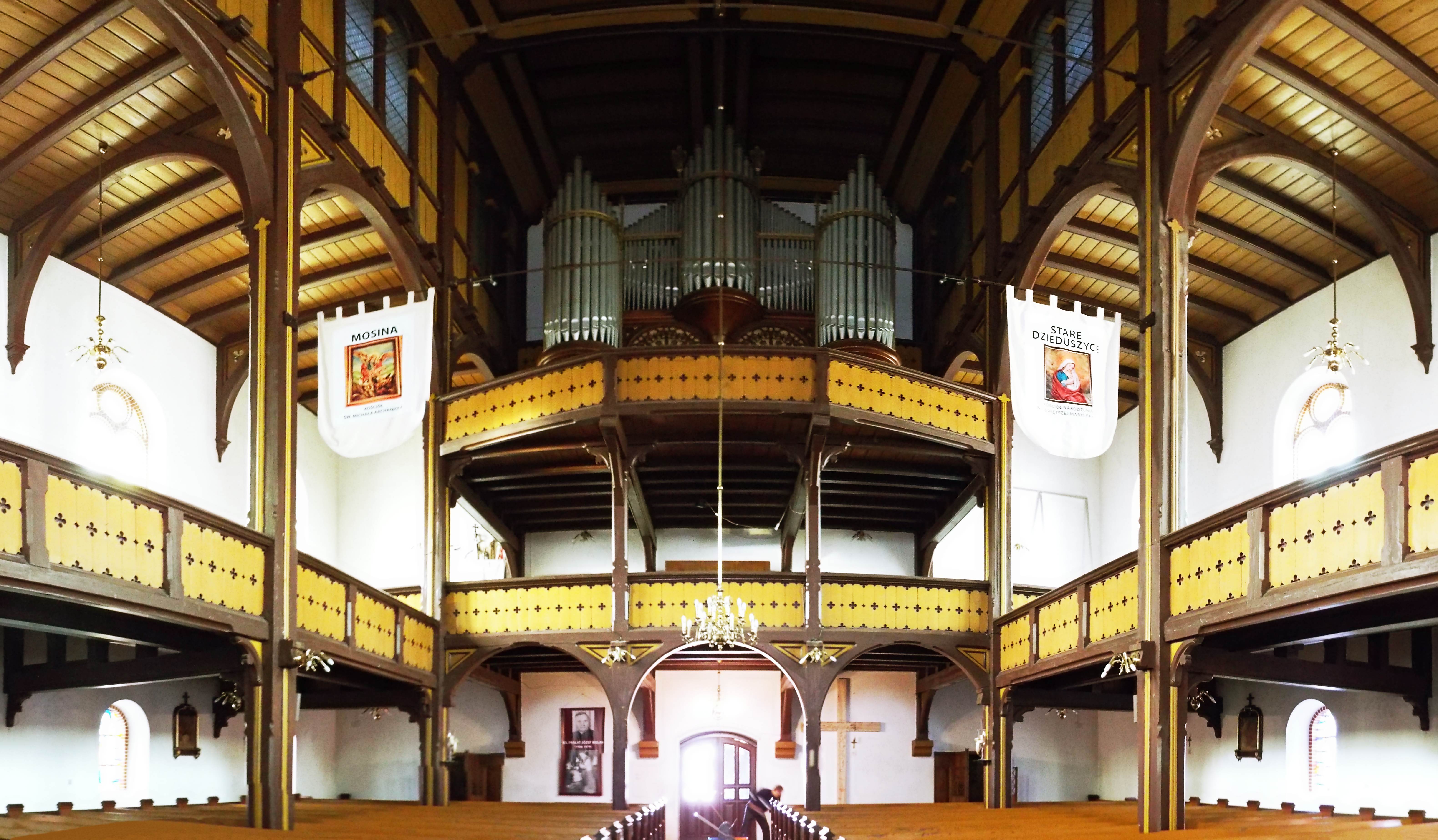 Witnica, kościół MB, empory i organy Sauera